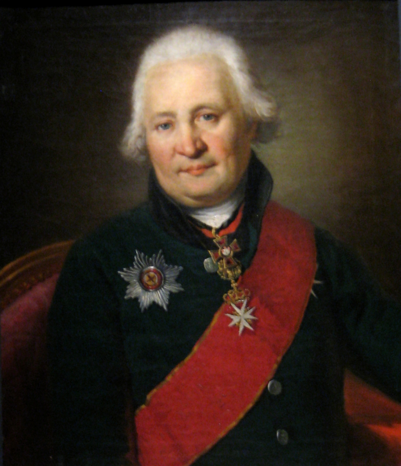 Н.И. Аргунов. Портрет Н.Н. Бантыш-Каменского. После 1808. ГИМ